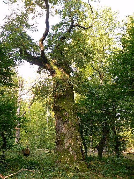 Prinzessinneneiche Baum